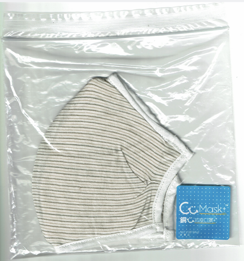 這是一個成人版本的銅芯抗疫口罩，包裝有銅芯抗疫口罩的標誌